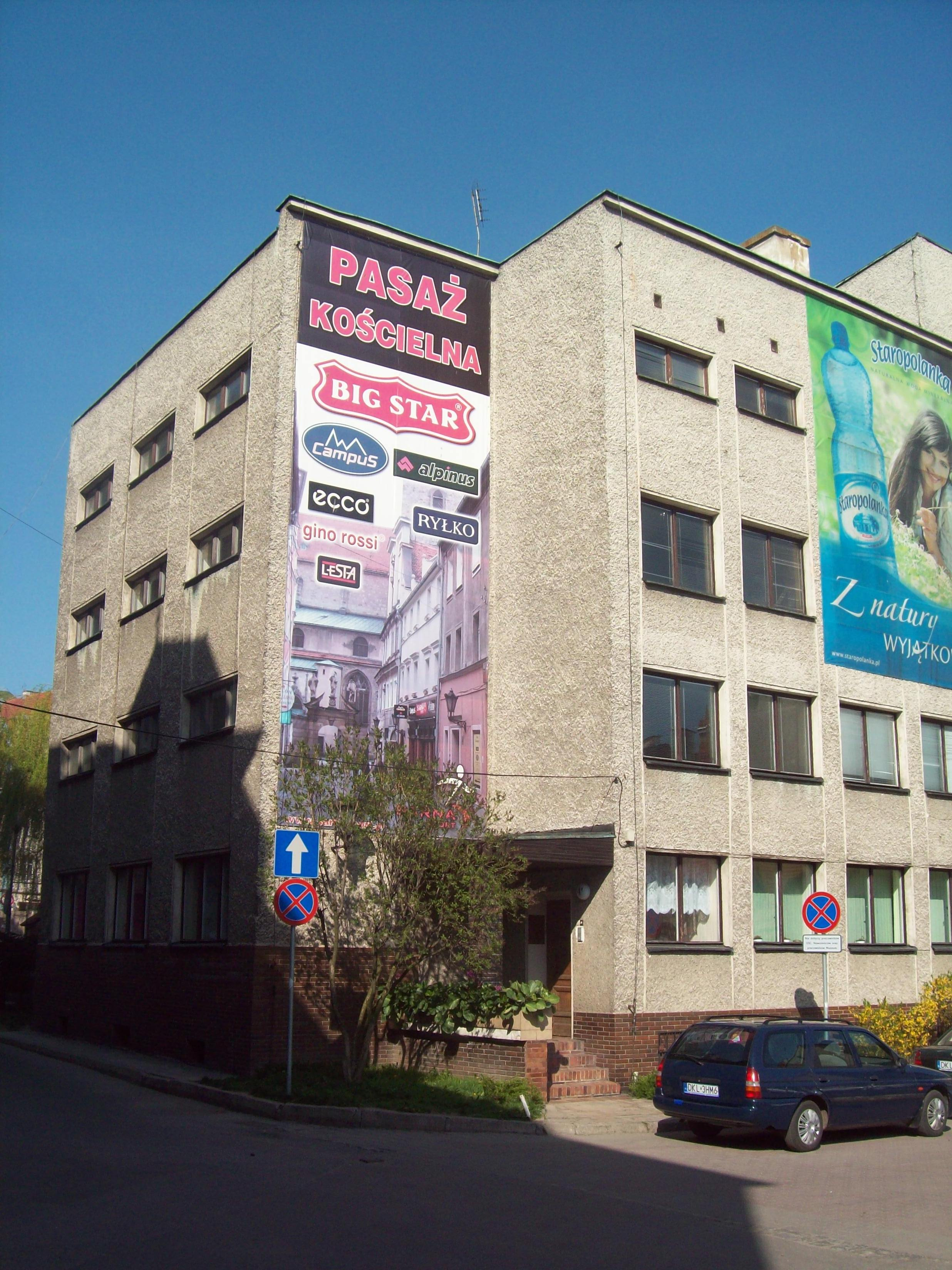 Muzeum Ziemi Kłodzkiej, nowa część przy ul. Muzealnej